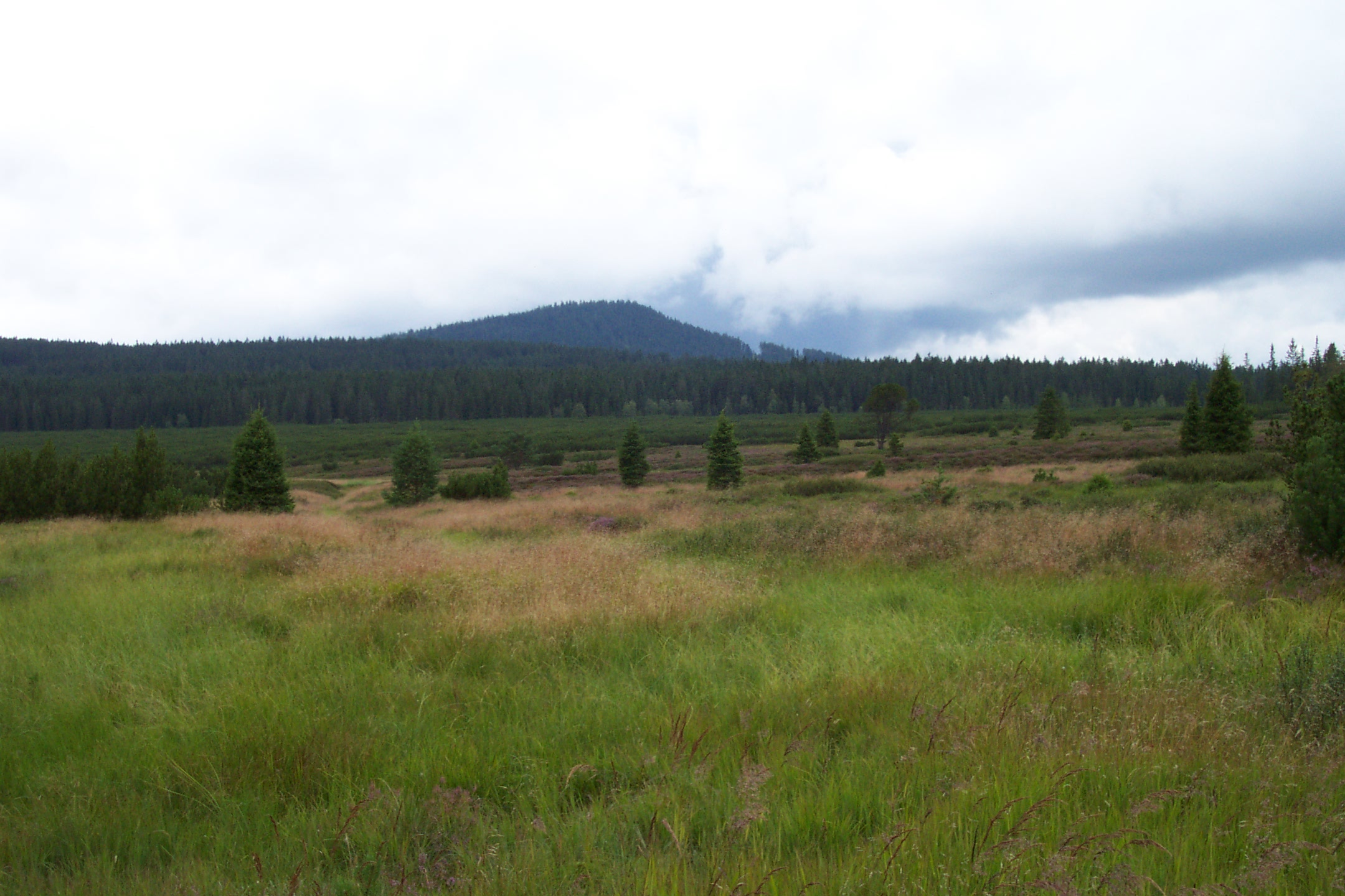 Šumava, Czech republic, Jezerní slať near Horská Kvilda - Šumava, Jezerní slať nedaleko Horské Kvildy